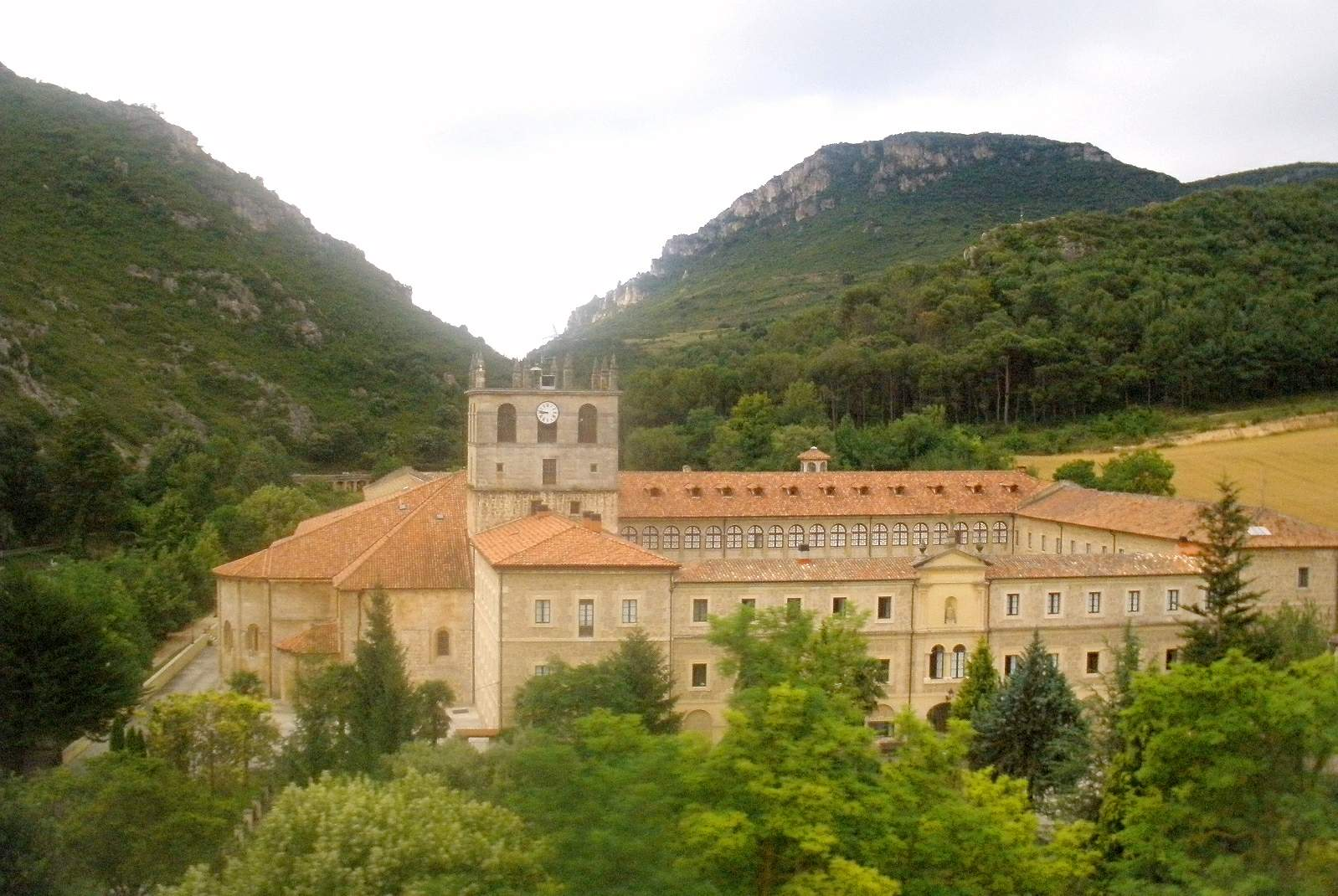 Bugedo (Burgos) - Monasterio de Santa María de Bujedo de Candepajares